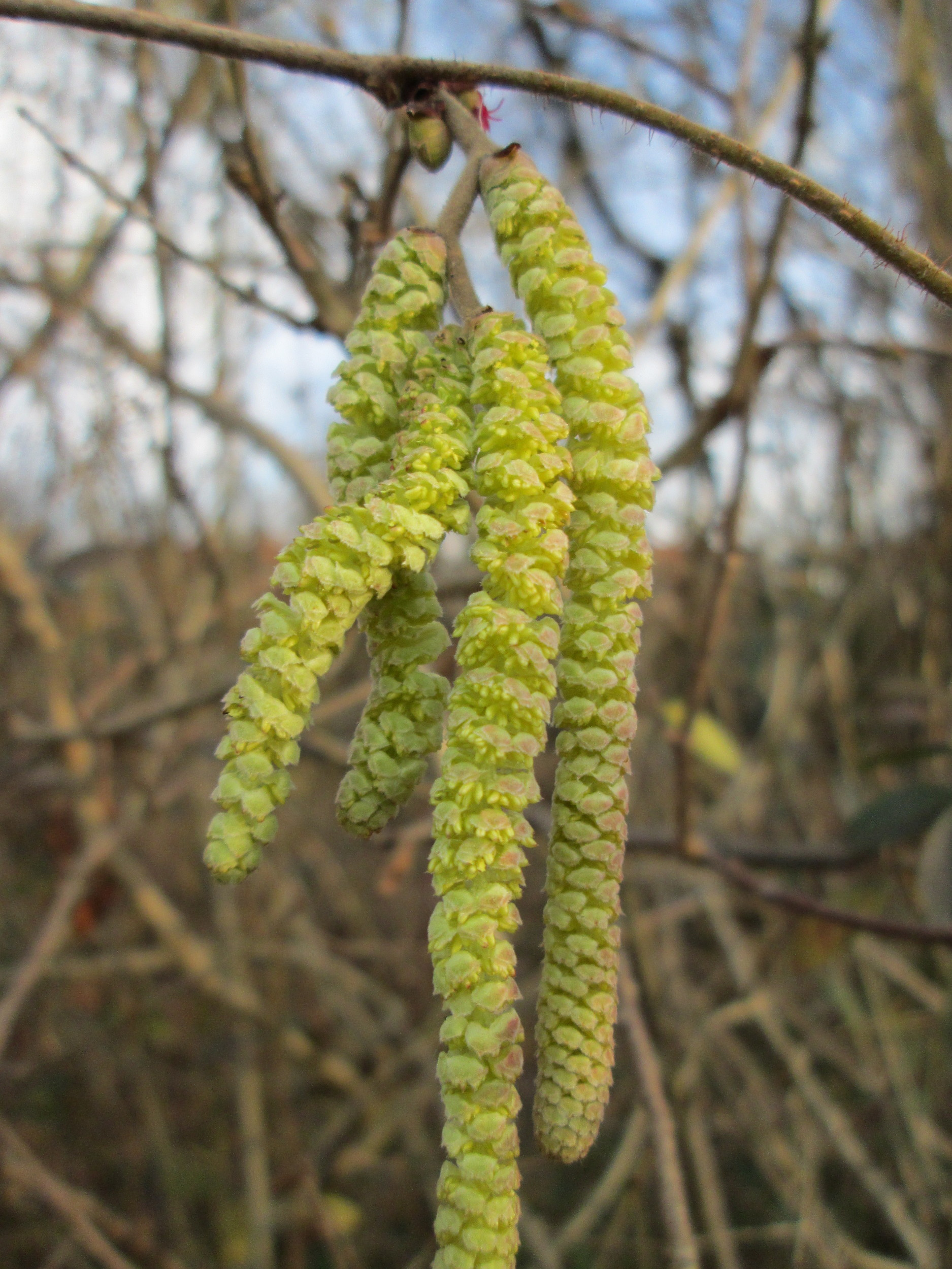 Blühende Haselnuss (Corylus avellana) in Hockenheim - einer der wenigen einheimischen Winterblüher in Mitteleuropa